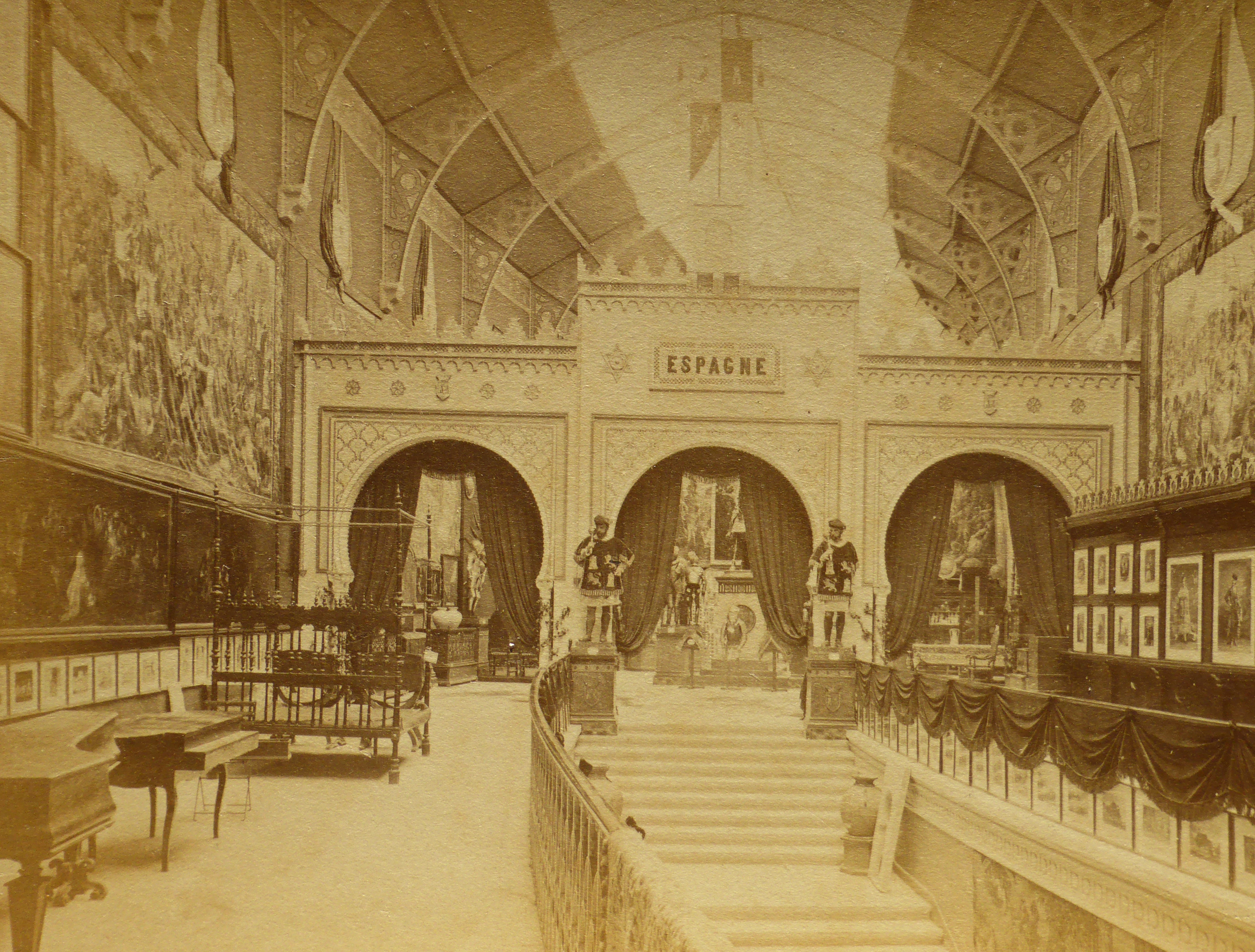 En la Exposición Universal de París, del año 1878, España participó en la muestra de arte retrospectivo del Palacio del Trocadero. Esta fotografía fue tomada aproximadamente en mayo de 1878, por la casa fotográfica de los Neurdein (una familia de fotógrafos franceses). La vista es del interior de un ala del Palacio del Trocadero, con la sección española. A la izquierda vemos la pintura "El Aquelarre", de Goya (que en 1875 se arrancó de los muros de la casa de la Quinta del Sordo, o Quinta de Goya, de Madrid), que era propiedad del barón de Erlanger (un banquero con residencia en París). La fotografía original es una copia en papel a la albúmina, del formato "tarjeta álbum", de la colección particular de C. Teixidor. Aquí se publica por primera vez. Además de 3 obras de Goya (a la izquierda), también vemos colgados grandes tapices, y fotografías enmarcadas de J. Laurent, en la antesala de los arcos (donde figura el nombre "Espagne"), que dan paso a las piezas de la Real Armería de Madrid, que viajaron temporalmente a París.